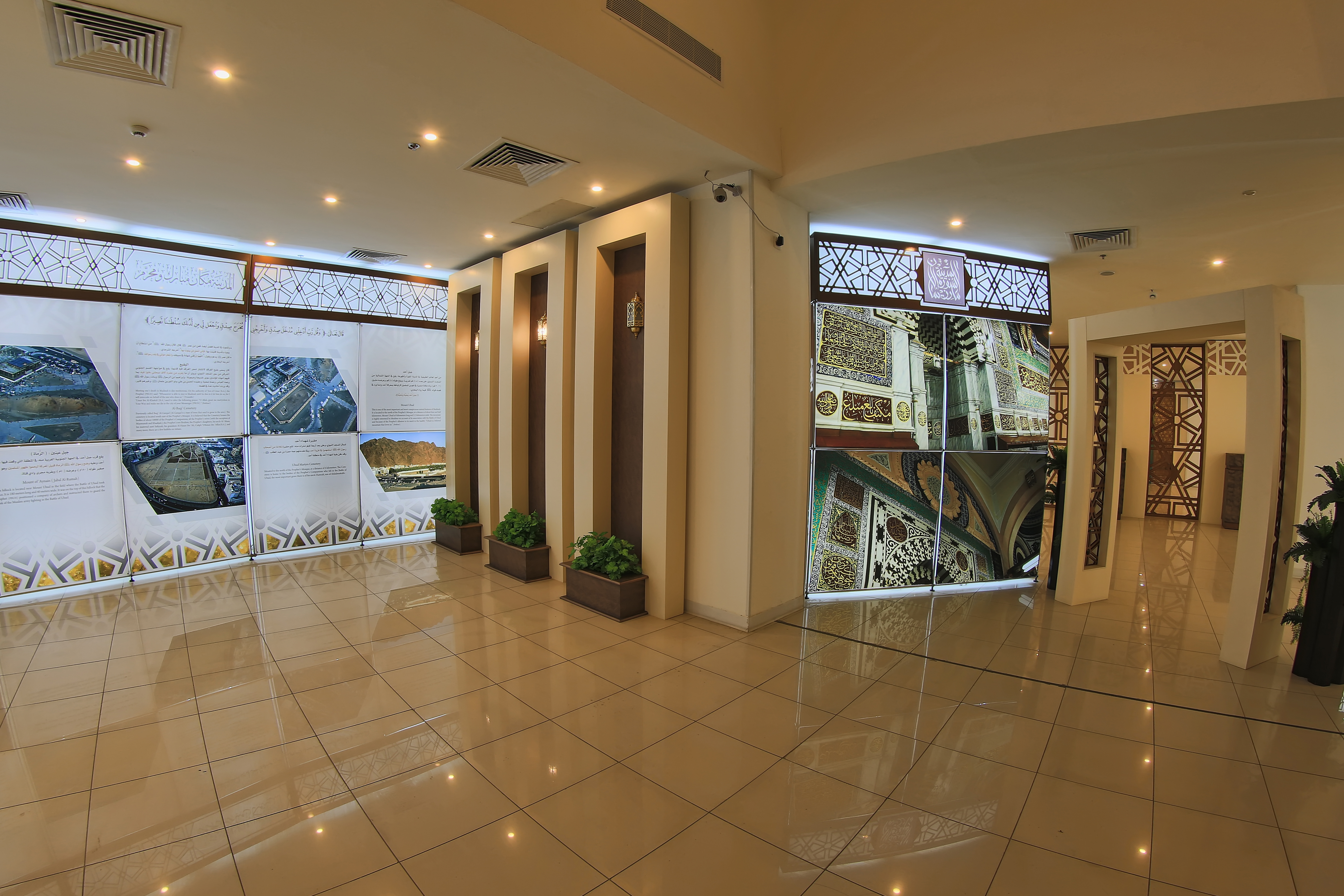 المدينة مكان محرم وفضيل